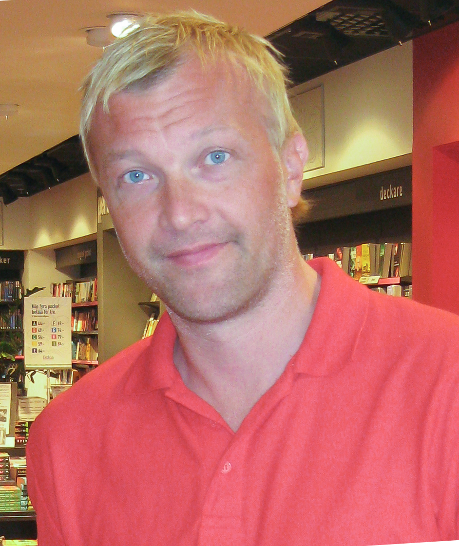 Magnus Hedman på boksignering.